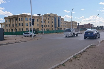 ウランバートルより北東へ600kmほど位置する ドルノド県チョイバルサン市にあるドルノド県庁舎